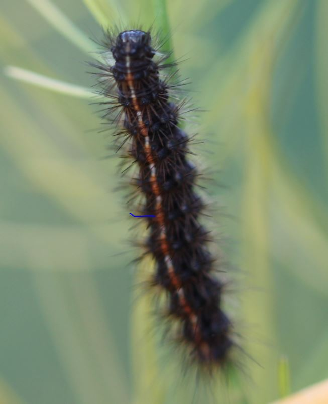 Raupe des Rotrandbärs (Diacrisia sannio) am 17.10.2017 in der Schwetzinger Hardt